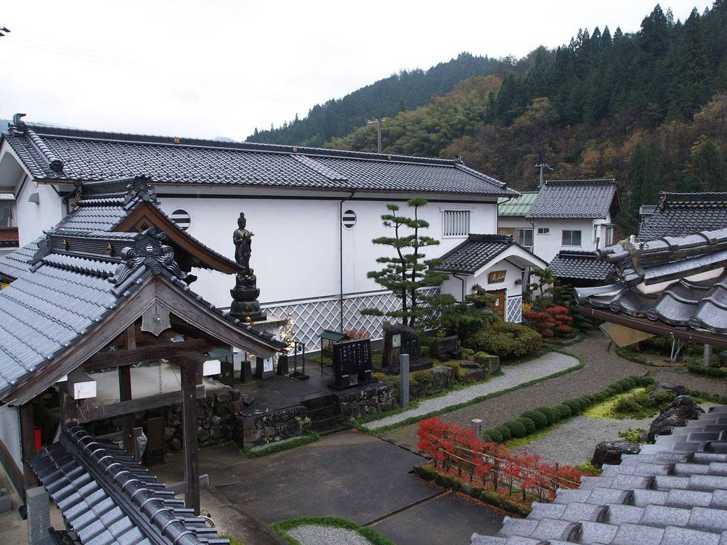 山名氏史料館「山名蔵」を望む